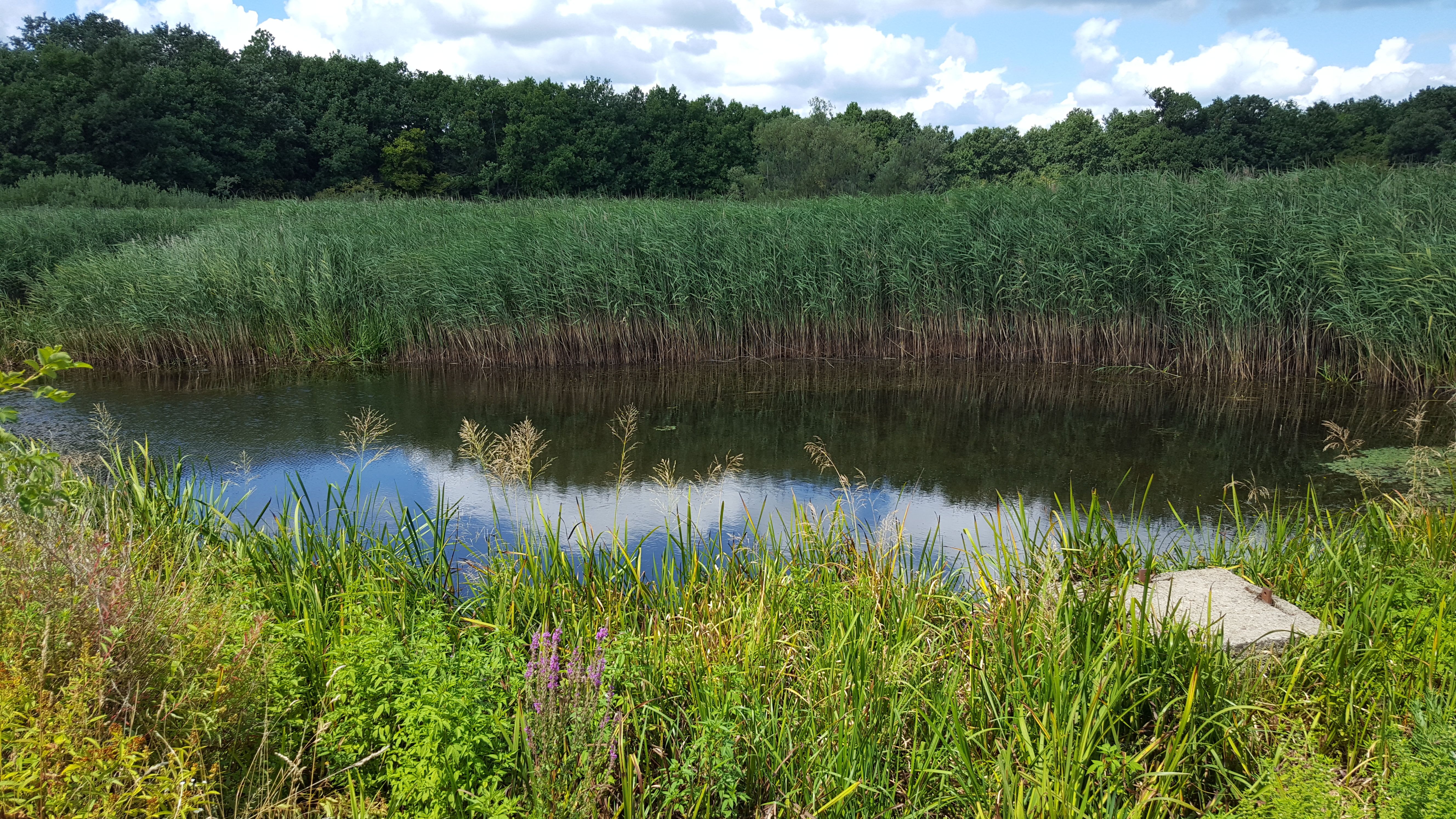 Sár-hegyi tó, a Szent Anna kápolna mellett, Abasár felett.